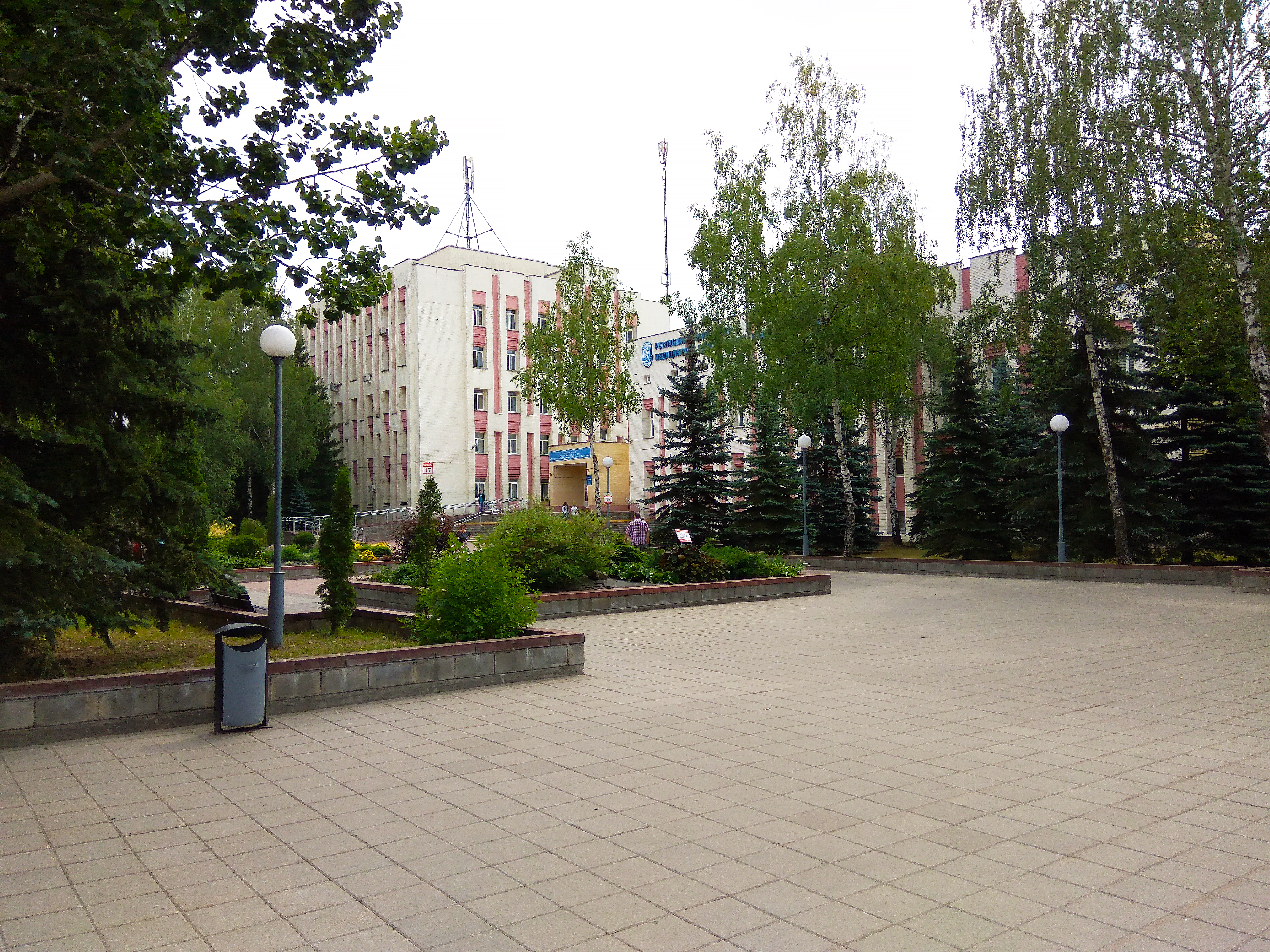 Мінск. Вуліца Макаёнка. Рэспубліканскі цэнтр медыцынскай рэабілітацыі і бальнеалячэння